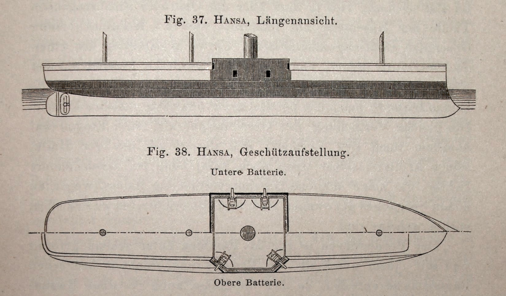 SMS Hansa aus: von Kronenfels, J. F.: Das schwimmende Flottenmaterial der Seemächte. Eine kurzgefasste Beschreibung der wichtigsten europäischen, amerikanischen und asiatischen Kriegsschiffe der neueren und neuesten Zeit. A. Hartleben's Verlag, Wien. Pest. Leipzig 1881.